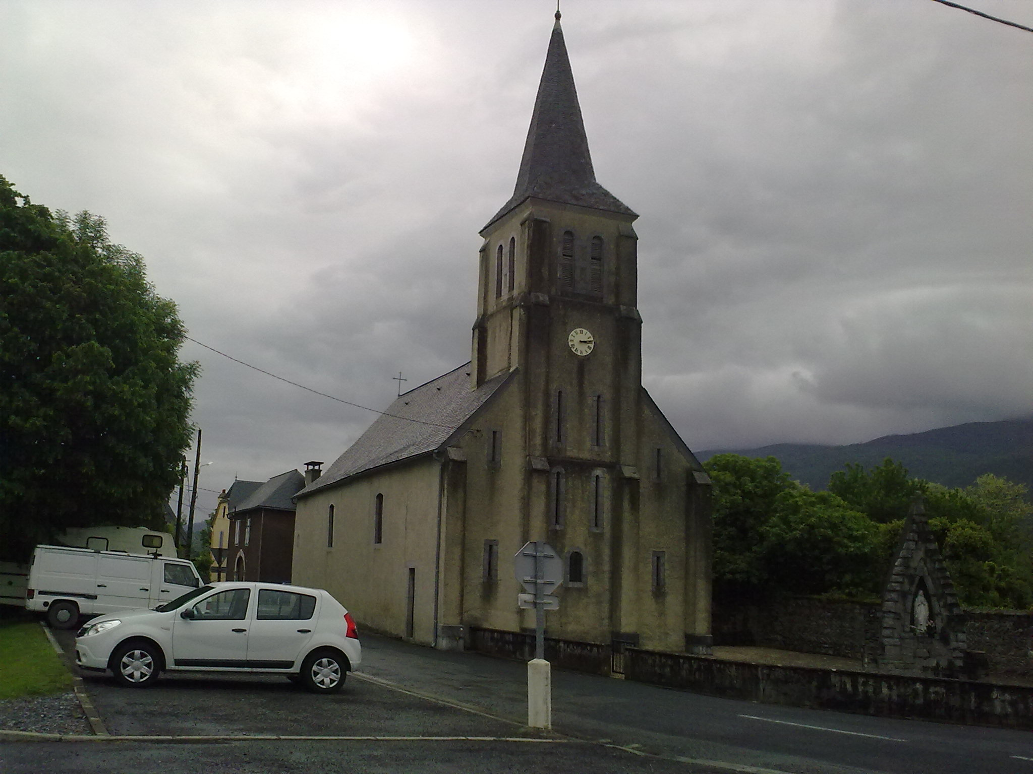 Asasp-Arros, France